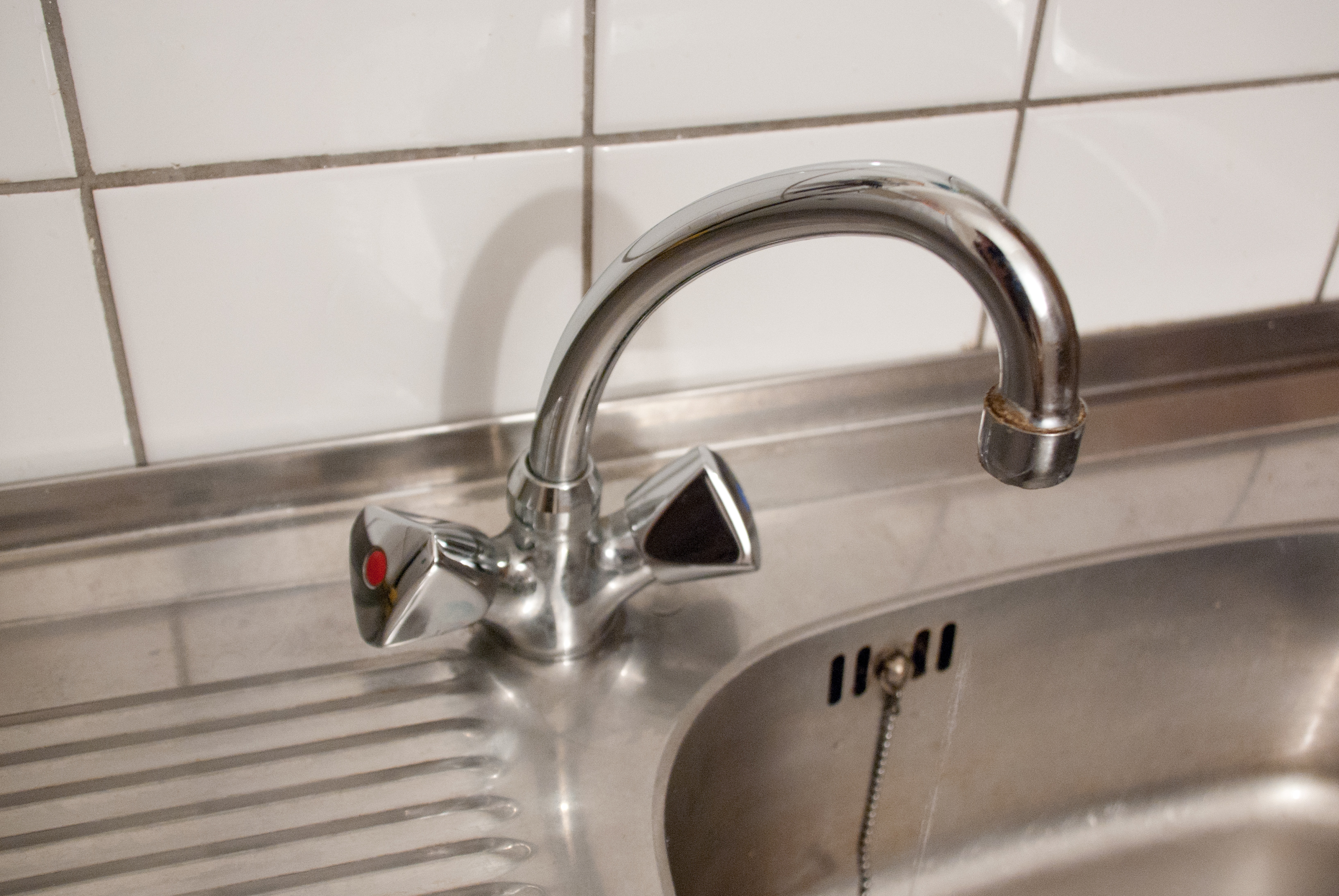 Die Ansicht einer Niederdruckarmatur von oben